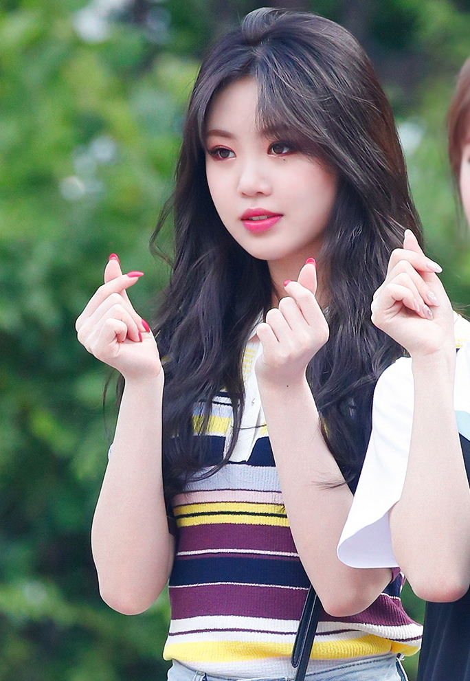 180604 뮤직뱅크 출근길 수진